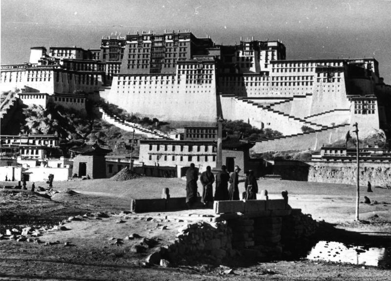 Lhasa, Potala und Brücke